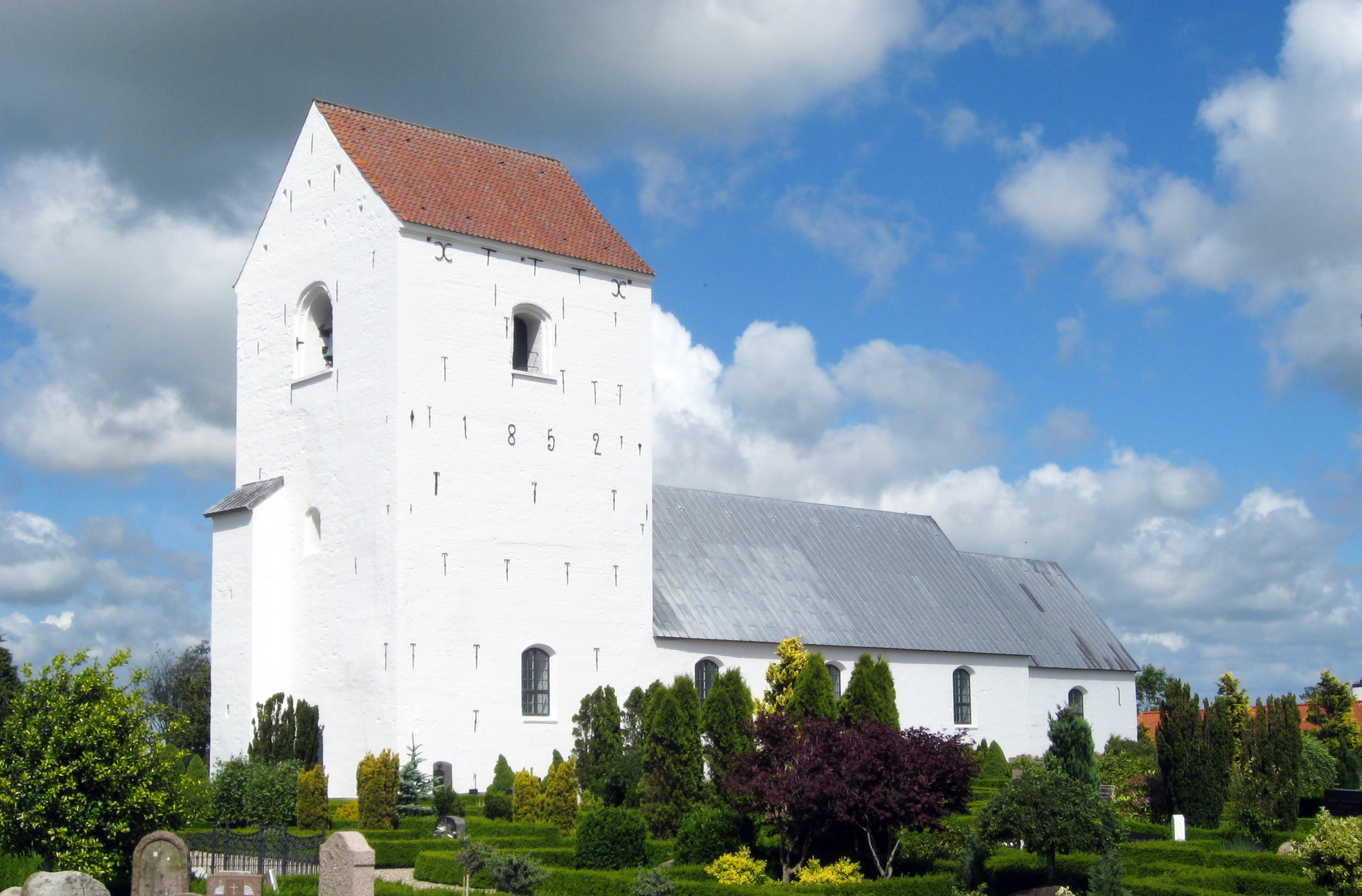 Torslev Kirke, Frederikshavn Kommune